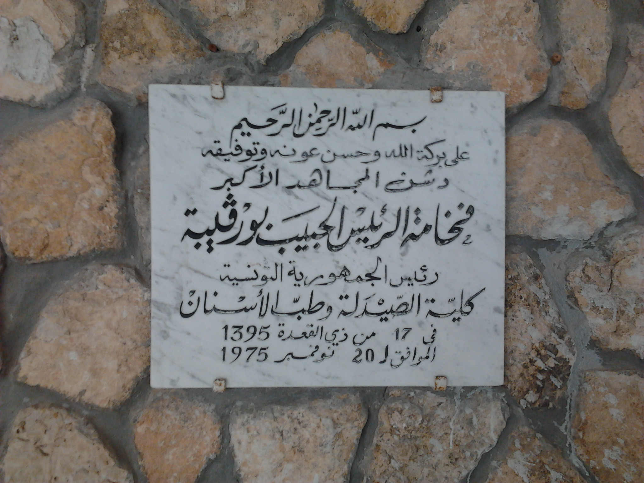 Au nom de Dieu le Clément, le Miséricordieux A inauguré par la bénédiction de dieu Le combattant suprême Son Excellence le président Habib Bourguiba, Le président de la république Tunisienne la faculté de pharmacie et de médecine dentaire de Monastir. C'etait le 17 Dhou Al Qiïda 1395 hégir/20 Novembre 1975